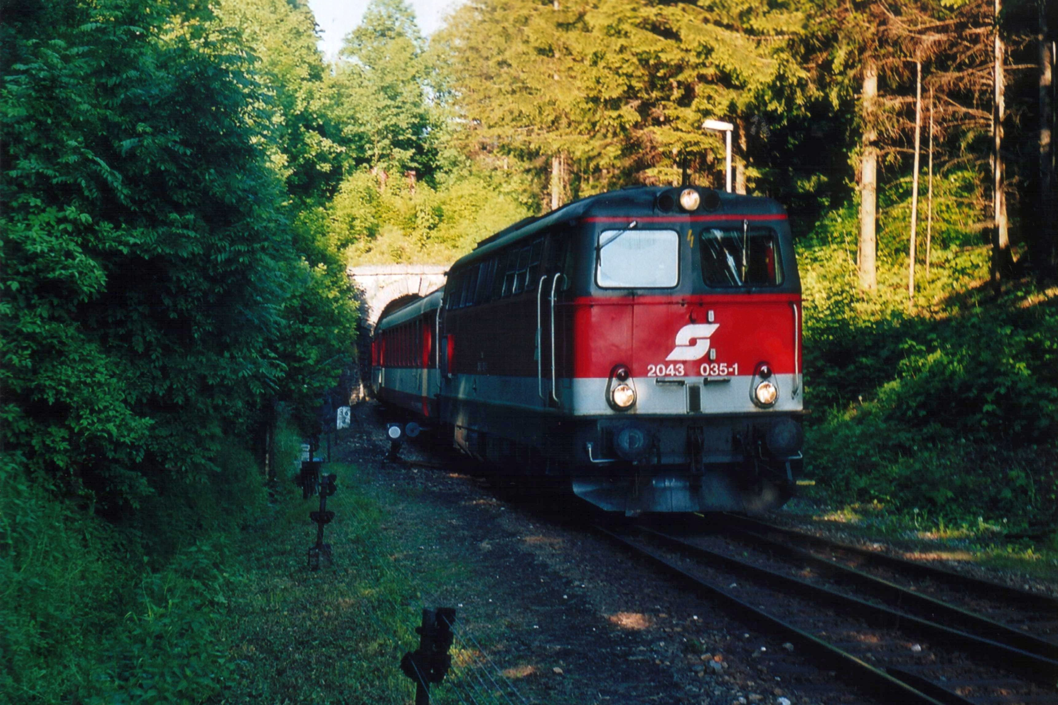 Südwestportal des Gerichtsberg-Tunnels, Einfahrt in den ehemaligen Bahnhof Gerichtberg